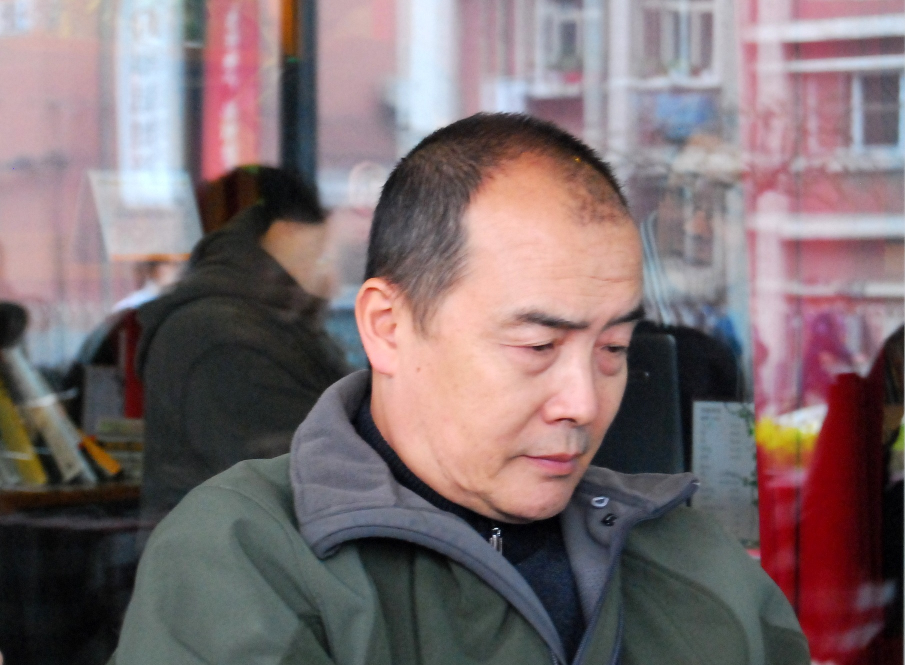 王力雄